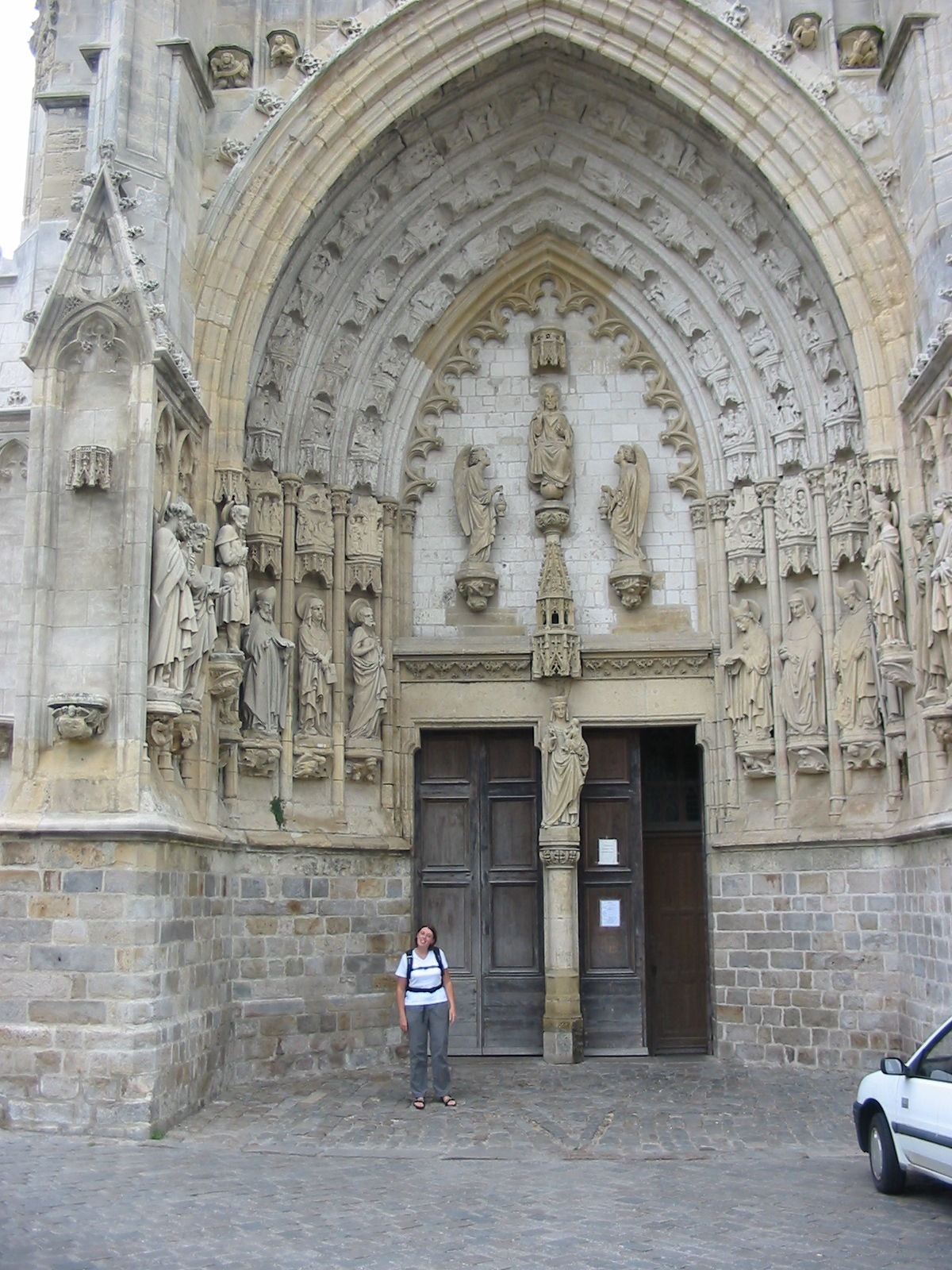 Church, Montreuil-sur-Mer, France